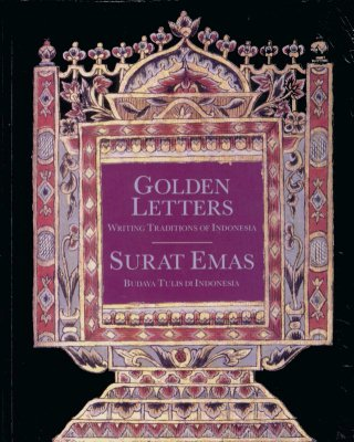 Kaft van het boek Golden Letters / Surat Emas wat eigenlijk een soort catalogus is van een aantal Indonesische handschriften. Auteurs Ben Arps en Annabel Teh Gallop, 1991. Zelf gefotografeerd en in zeer lage resolutie.